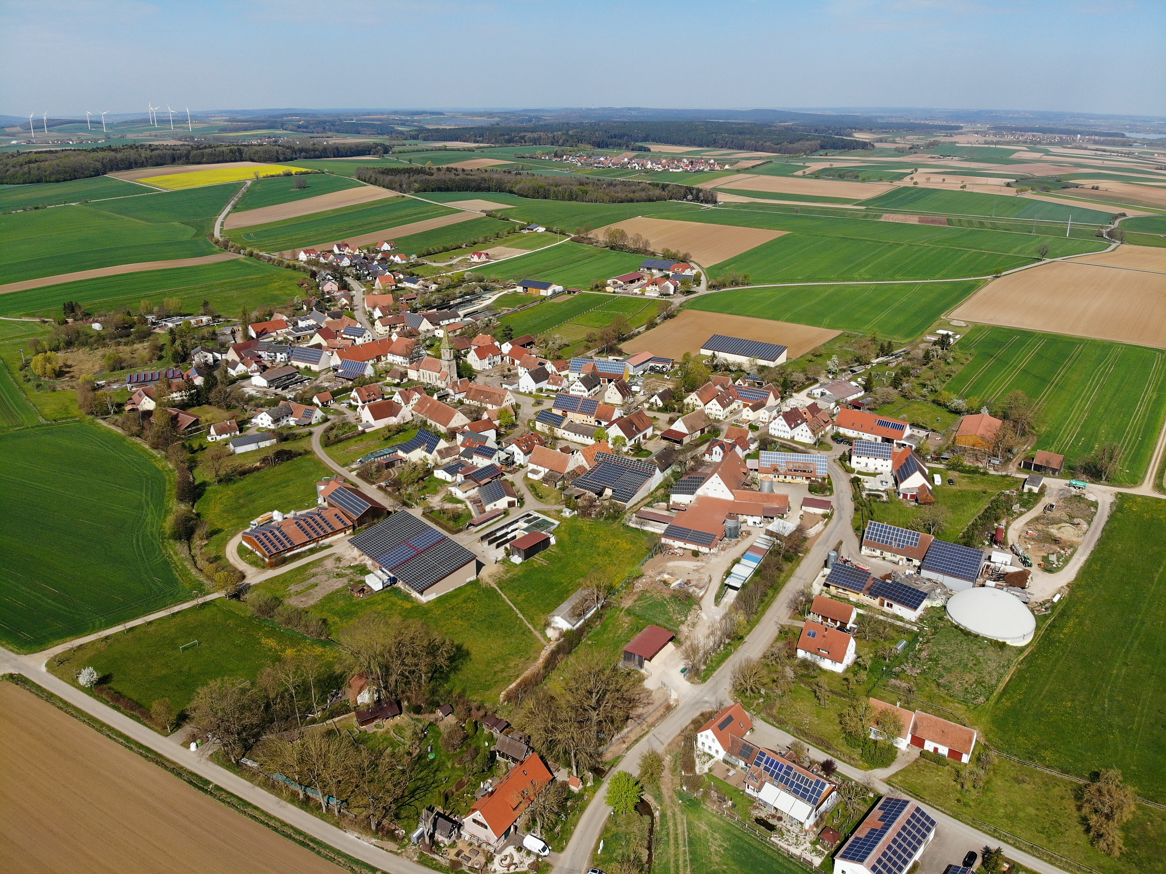 Sausenhofen (Dittenheim) Luftaufnahme (2020)